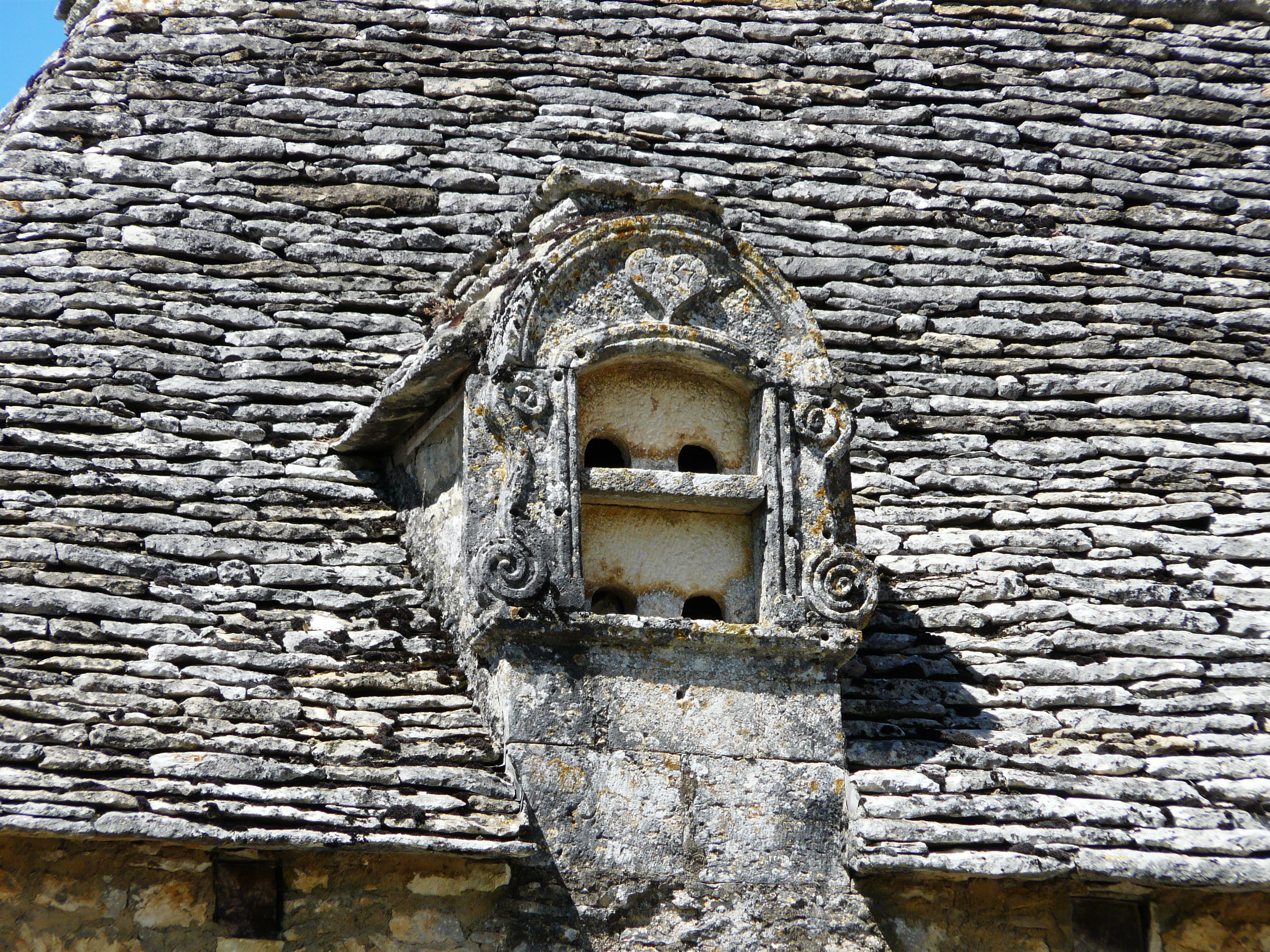 Détail du toit, presbytère de La Cassagne, Dordogne, France